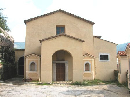 Santa Maria delle Grazie Church (Vallecorsa)